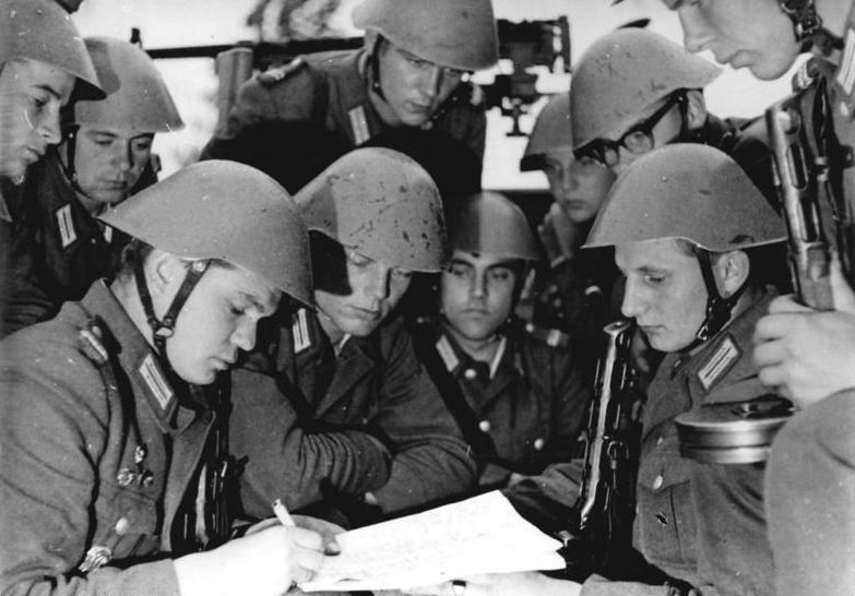 ADN-ZB-22.8.1961-Berlin: Bereitschaftspolizei während des Einsatzes zur Durchsetzung der Grenzsicherungsmaßnahmen der DDR vom 13.8.1961. Die Wachtmeister und Unterführer der 2. und 3. Schützenpanzerwagen-Besatzung von der Einheit Opitz versichern in einem Brief an den Vorsitzenden des Staatsrates der DDR und Ersten Sekretär des ZK der SED, Walter Ulbricht, ihre unerschütterliche Treue zur Partei der Arbeiterklasse und zur Regierung des ersten deutschen Arbeiter- und Bauern-Staates. - Während der Unterzeichnung des Briefes. Veröffentlichung nur mit Genehmigung der Pressestelle des MDI